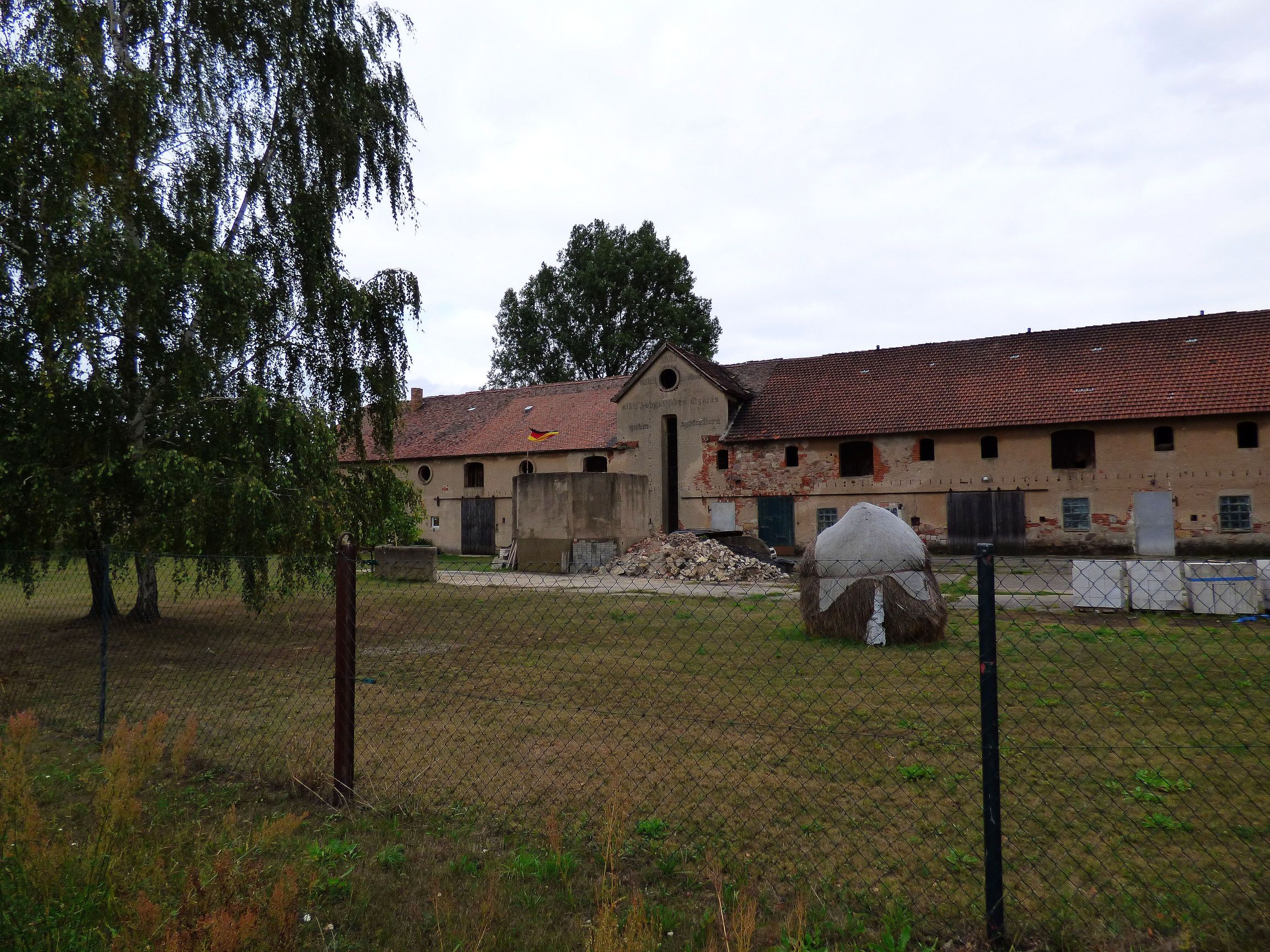 Gut Neu-Lönnewitz